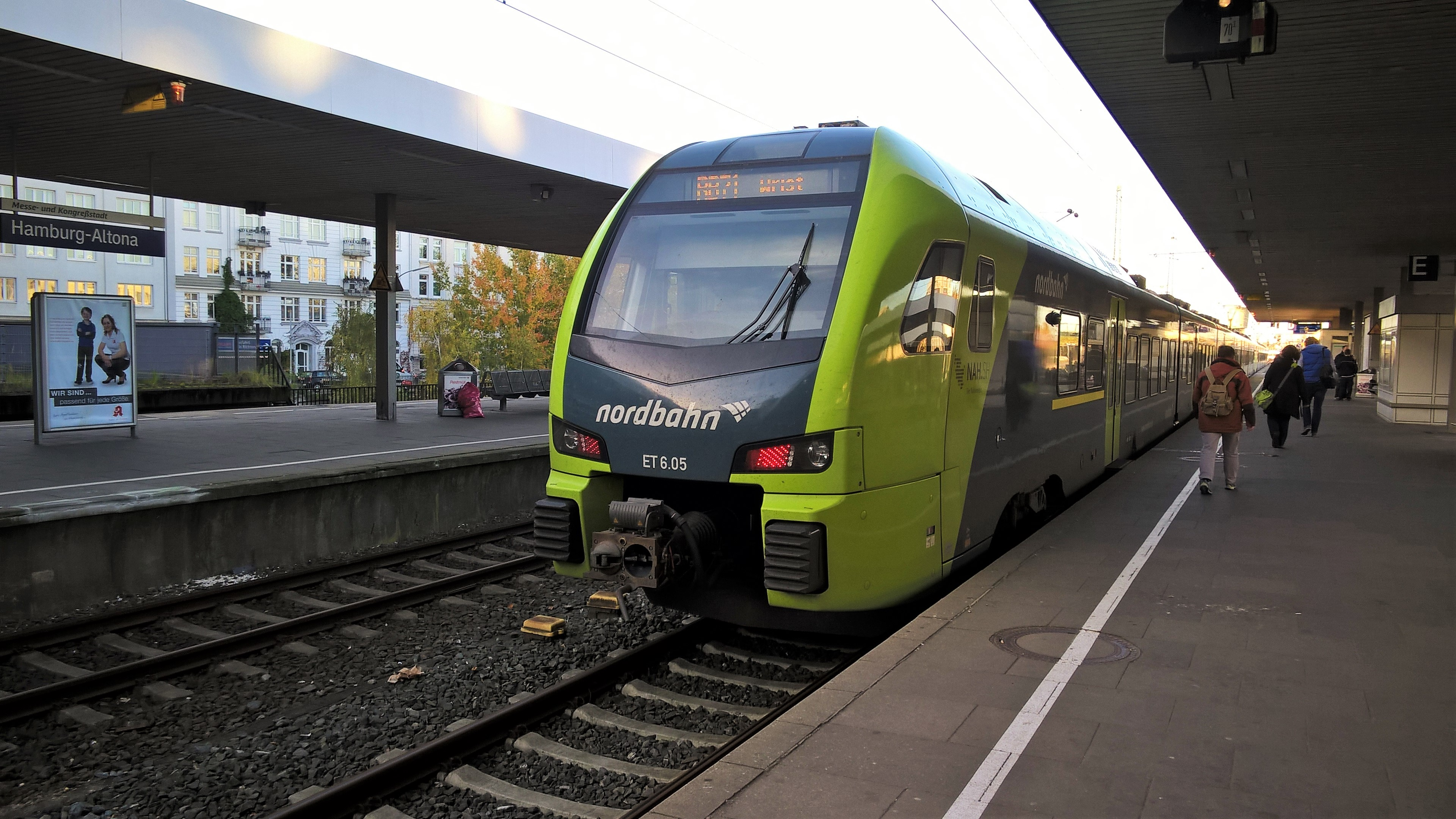 FLIRT 3 in Hamburg-Altona nach Wrist.